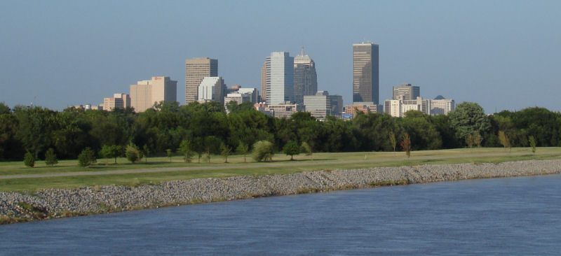 Skyline von Oklahoma City.